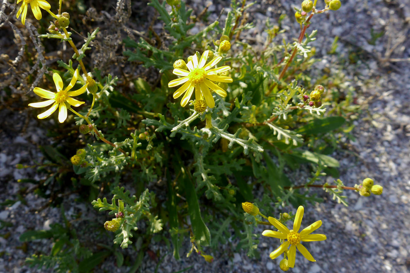 Senecio glaucus en Veneziola (La Manga del Mar Menor, España) en el límite sur del Parque Natural de las Salinas de San Pedro del Pinatar.